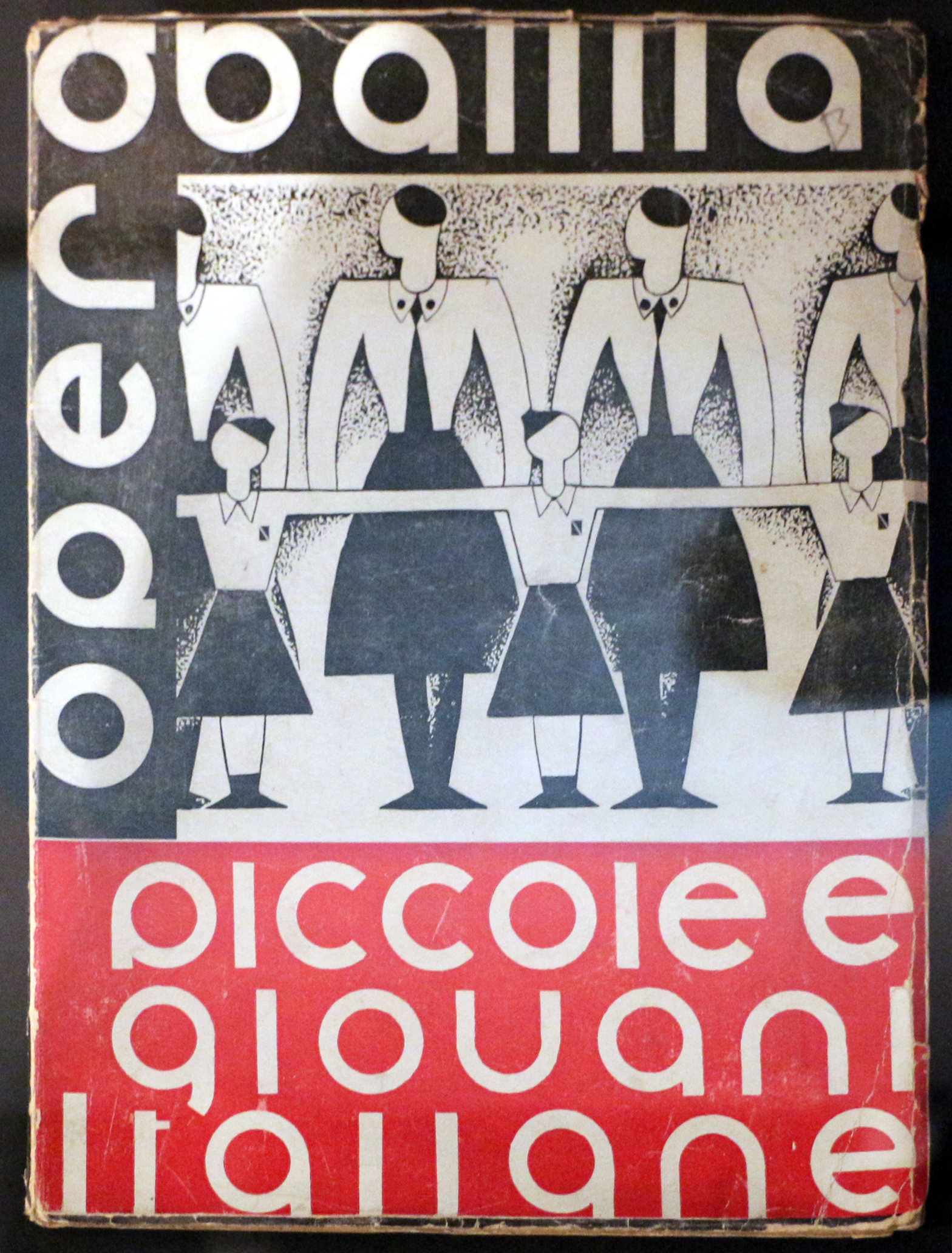 Il parco e i musei di Nervi This is a photo of a monument which is part of cultural heritage of Italy.